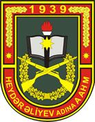 Эмблема Высшего военного училища